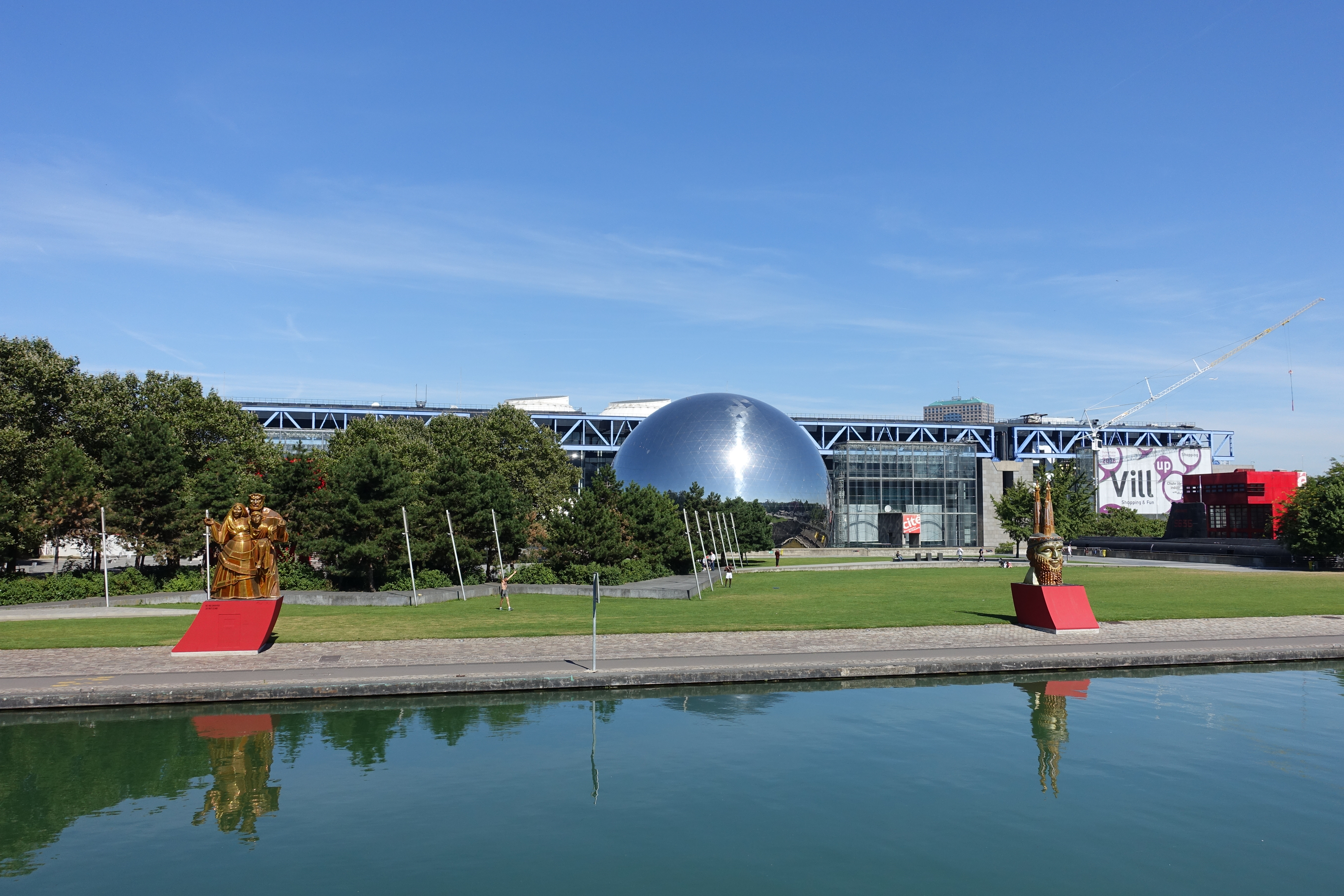 Rio Samba School statue @ Parc de La Villette @ Paris